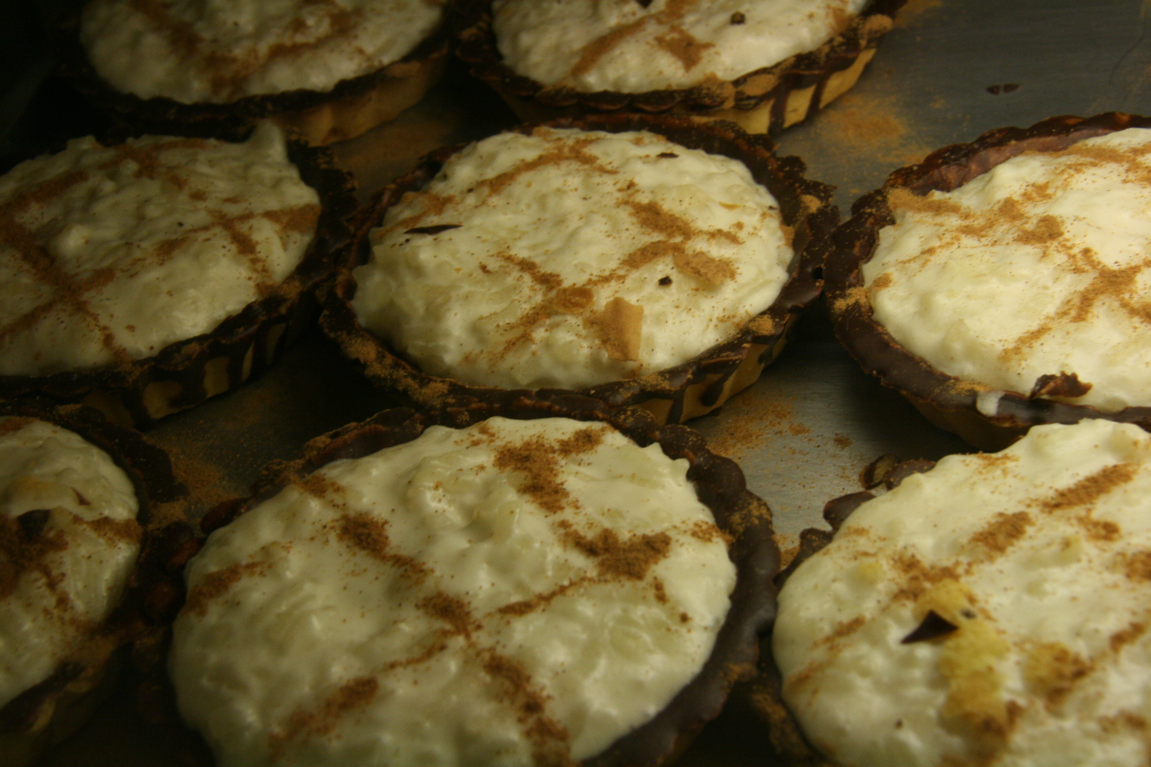 Arroz con leche - pastelería de Valladolid (Cubero)